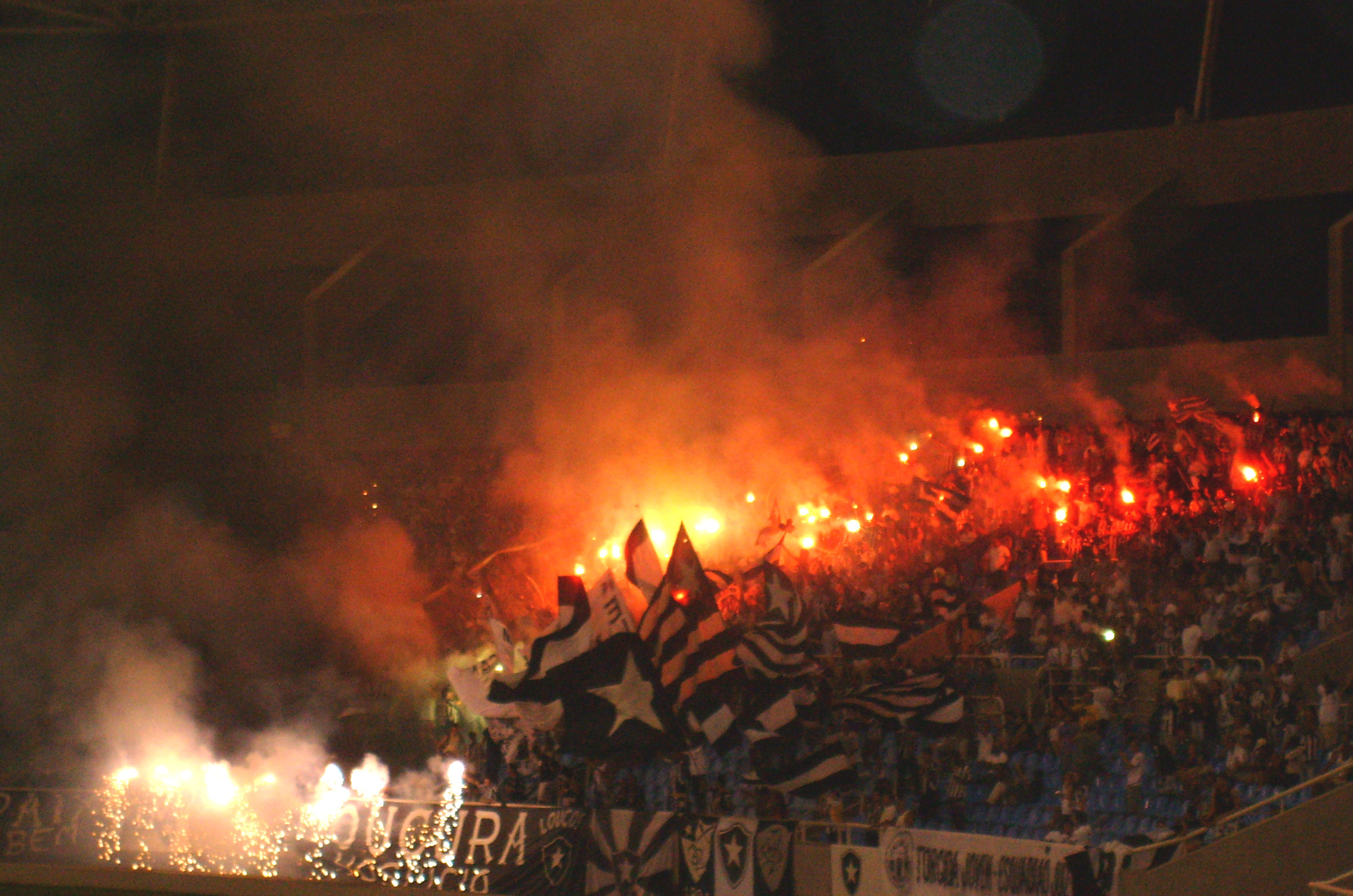 O movimento Loucos pelo Botafogo recebe o Botafogo FR na partida contra o Corinthians, válida pelo primeiro jogo semifinal da Copa do Brasil de 2008, em 20 de maio deste ano, no Engenhão.